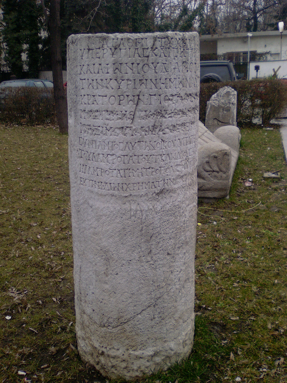 Милиарна колона на Клодий Сатурнин от Филипопол